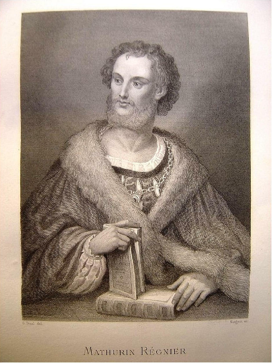 Mathurin Régnier, écrivain français.